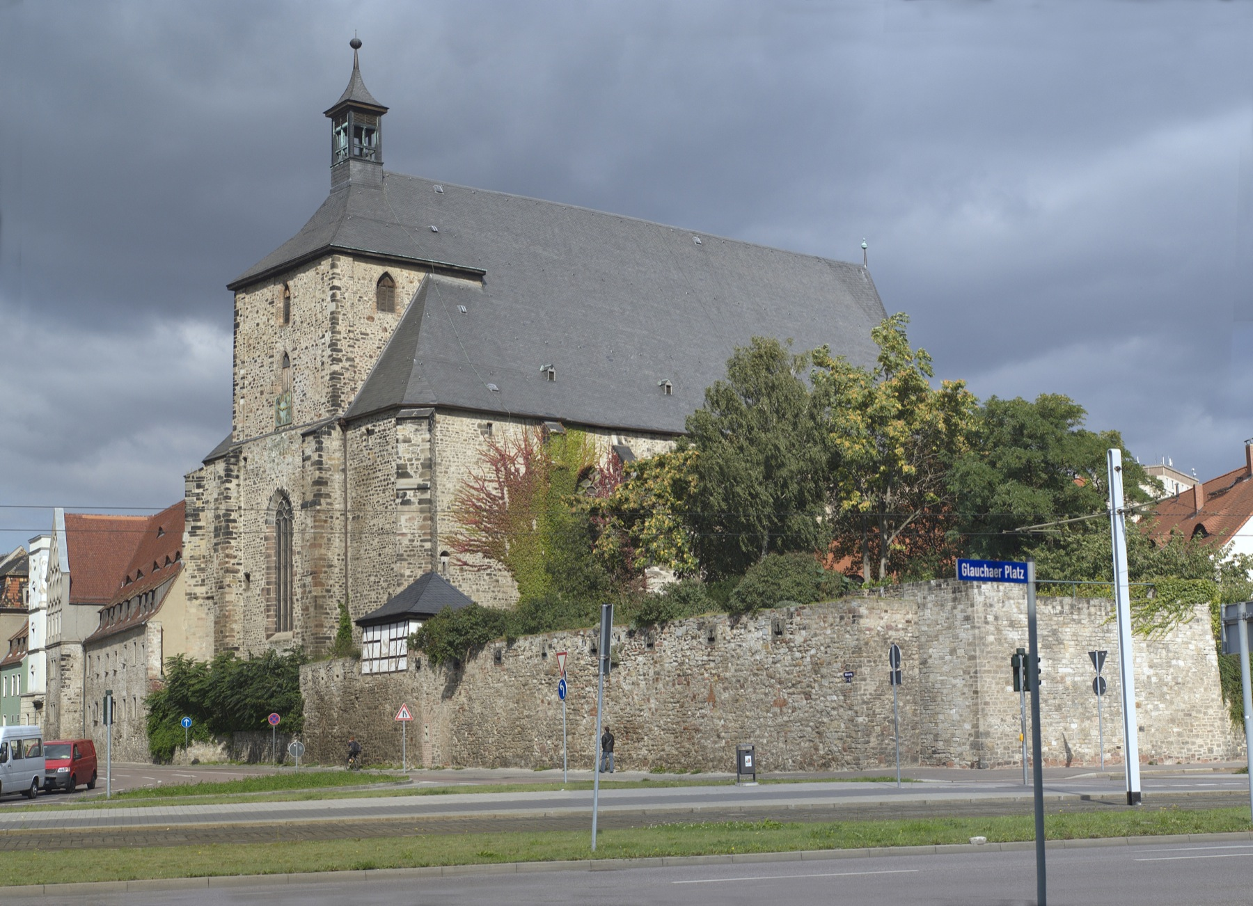 Moritzkirche